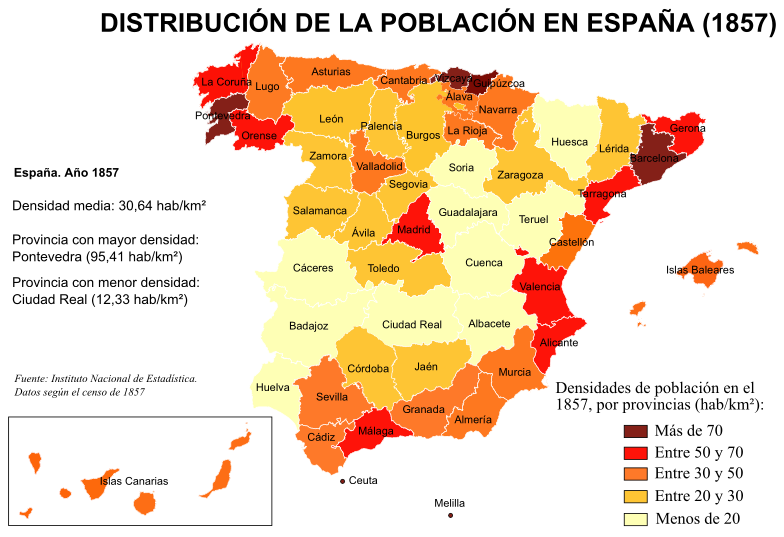 Mapa de España con las densidades de población por provincias actuales, según el censo del Instituto Nacional de Estadística de 1857.